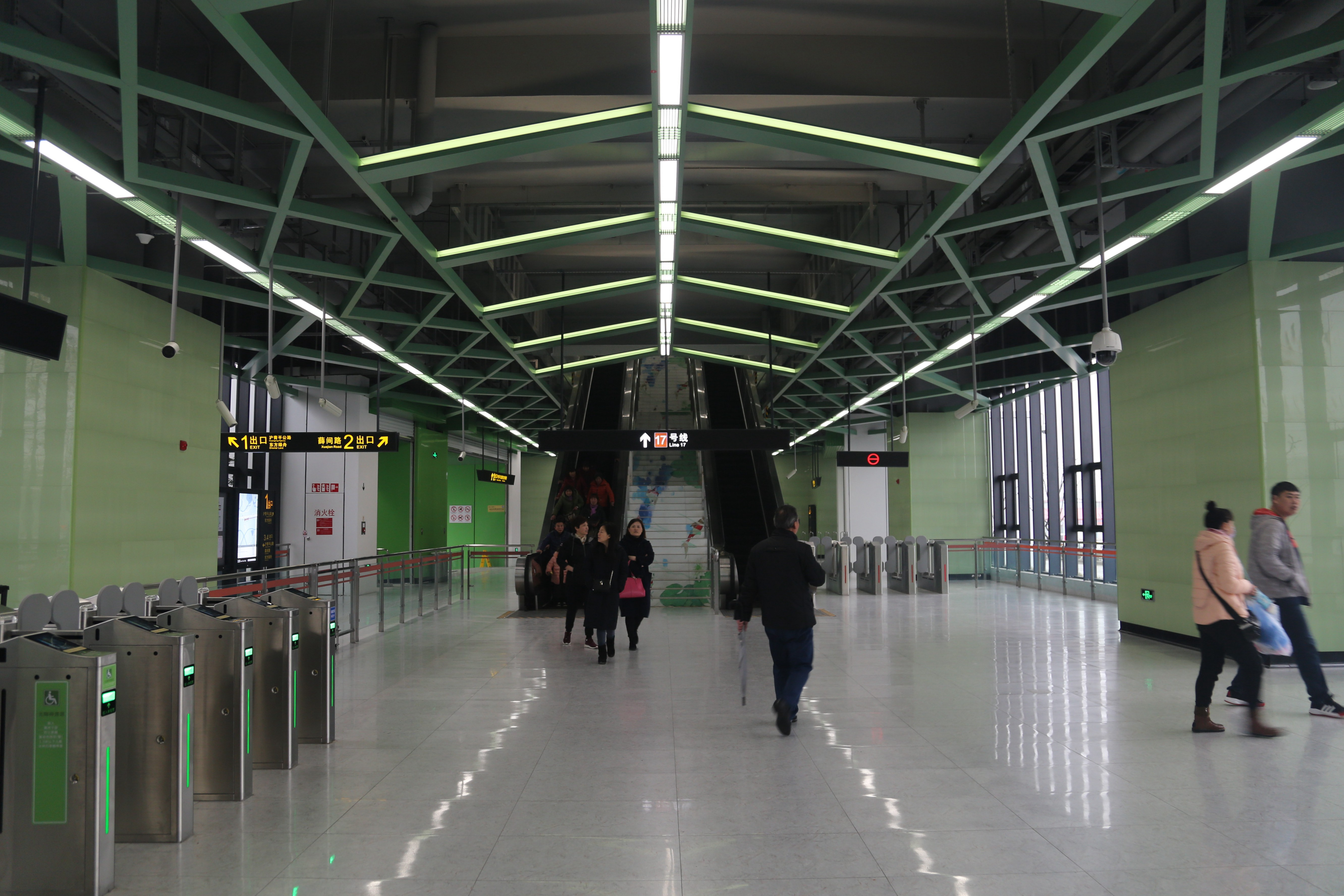 东方绿舟站站厅